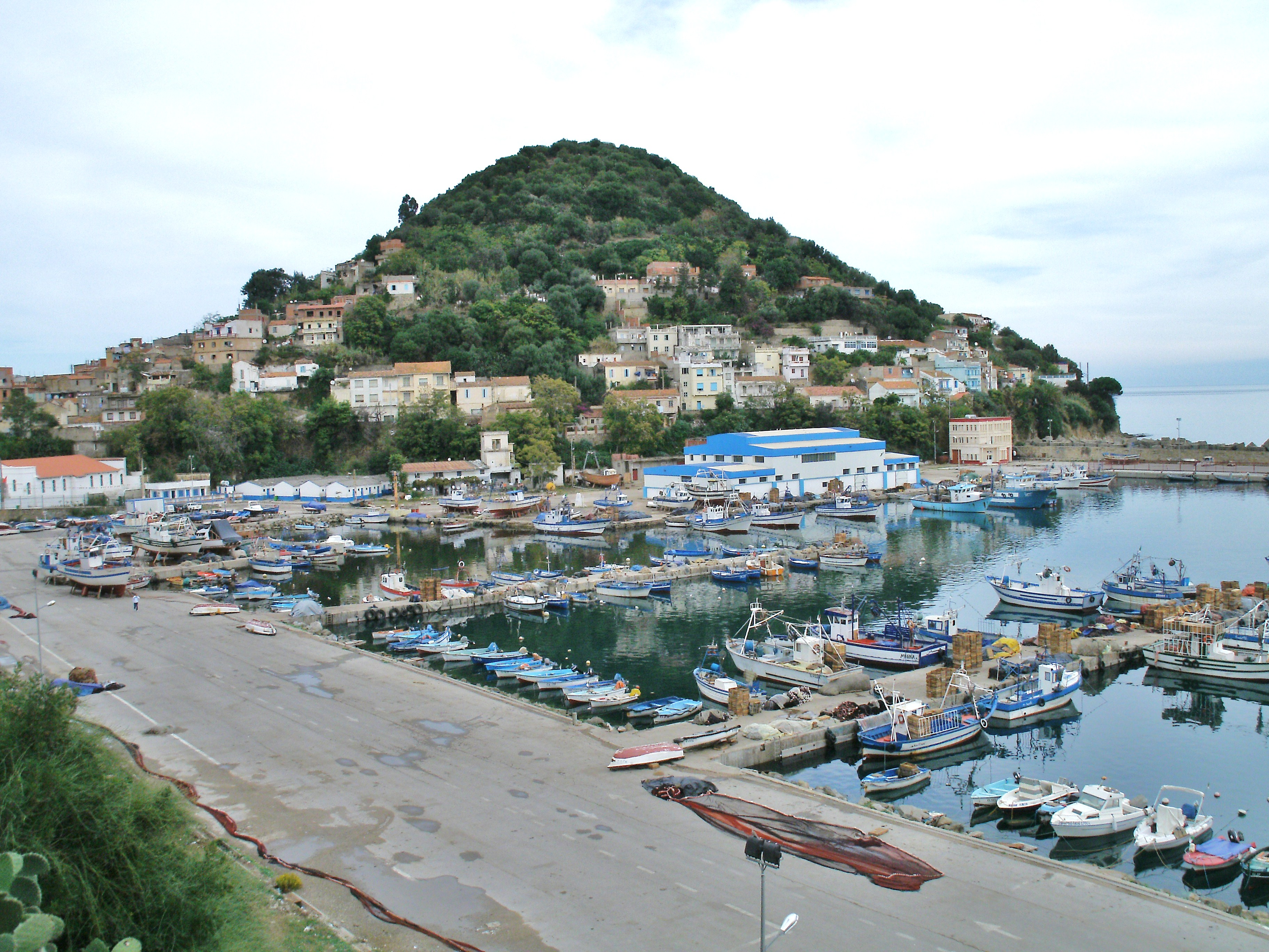 Vue partielle de Collo